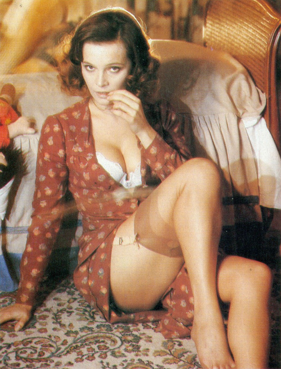 L'attrice italiana Laura Antonelli in uno scatto di scena sul set del film Malizia (1973) di Salvatore Samperi.